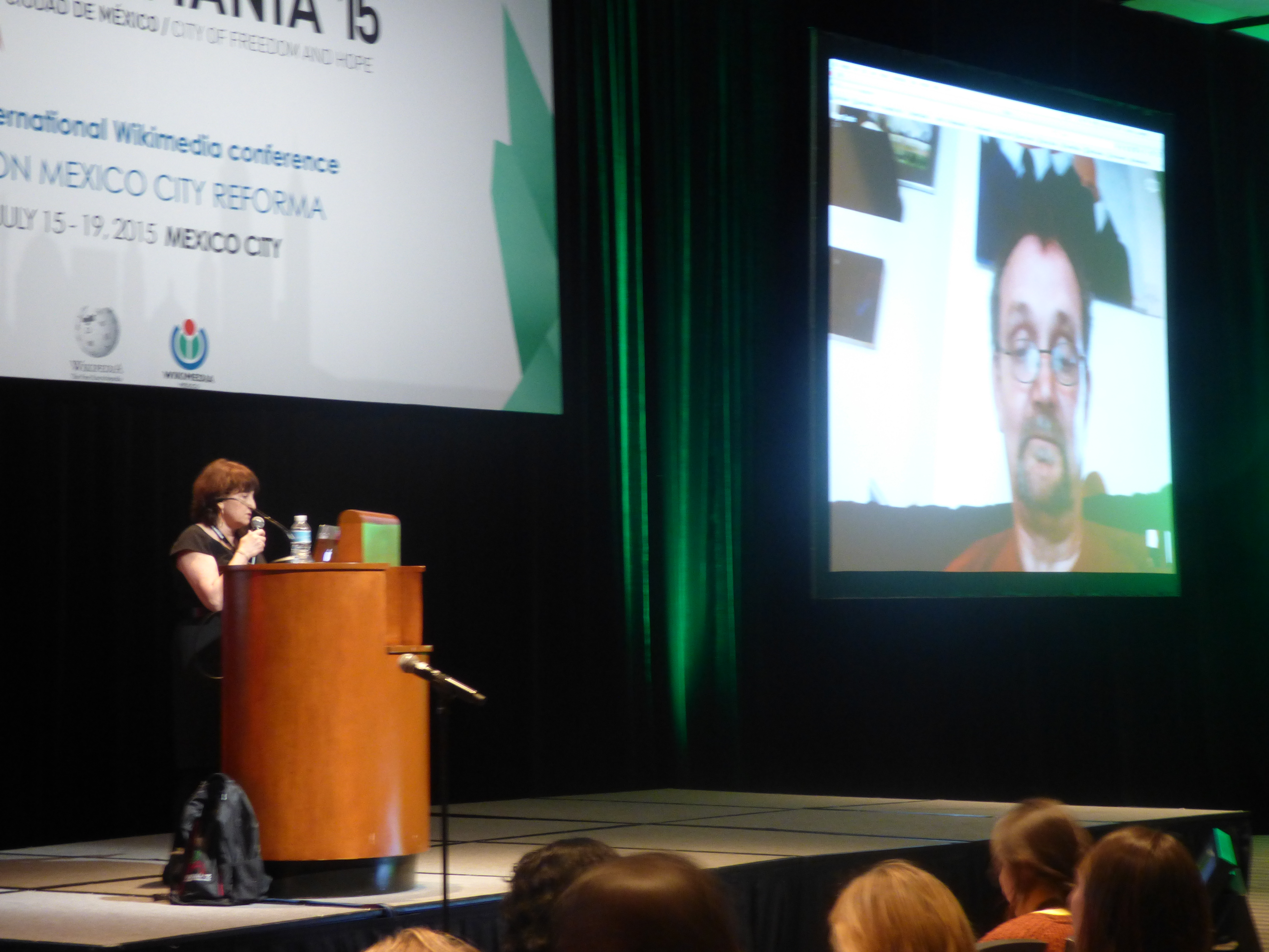 Roger Bamkin y Rosie Stephenson-Goodknight en Wikimania 2015 con la conferencia "How to improve the coverage of women in Wikipedia"